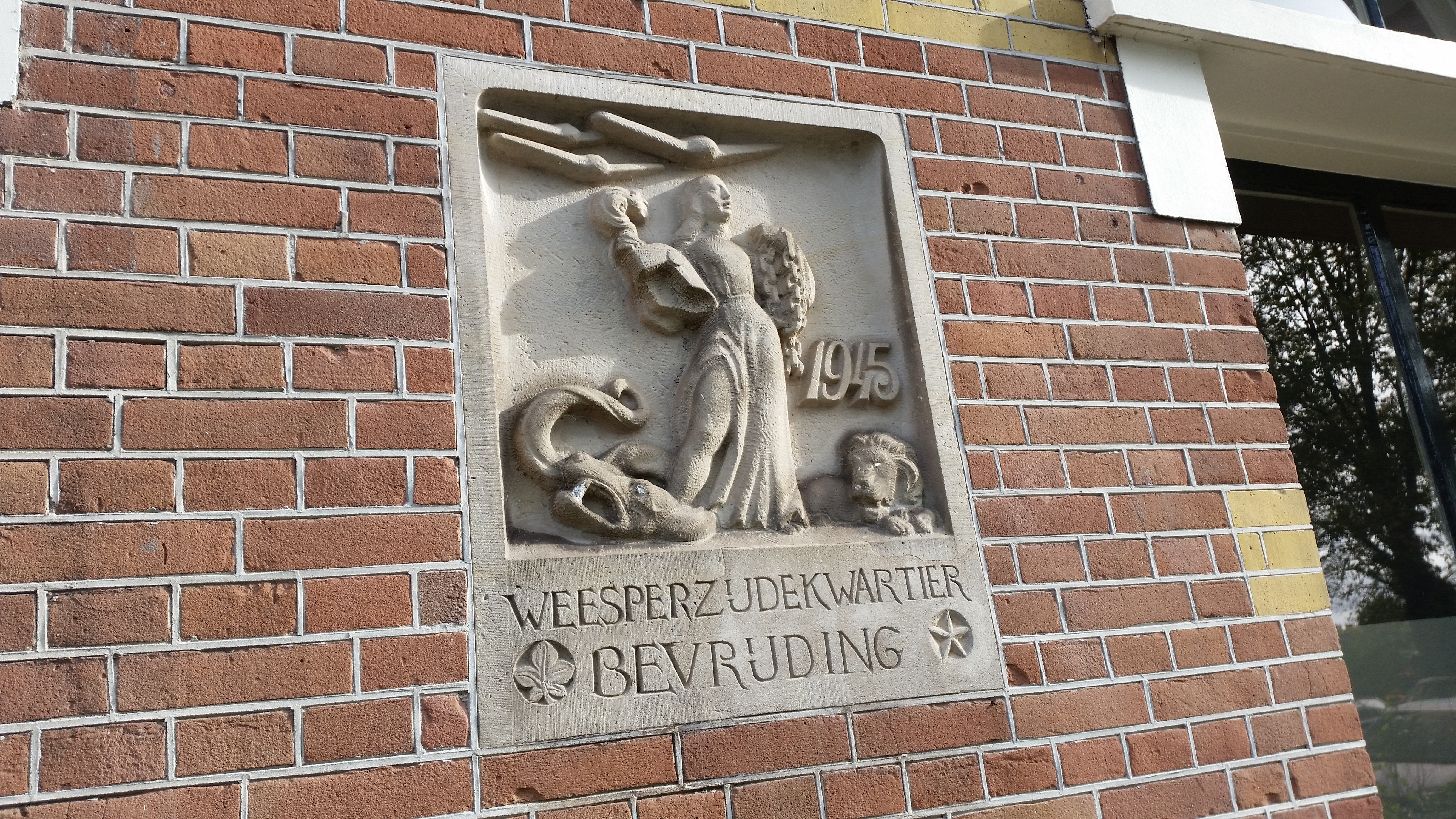 Herdenkingssteen aan de bevrijding van het Weesperkwartier aan Weesperzijde 99, Amsterdam, de voormalige Utermöhlenfabriek, daarna BB en weer later appartementen